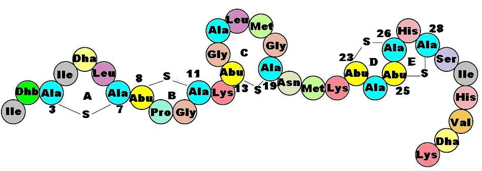 Nisin_2d_amino_structure